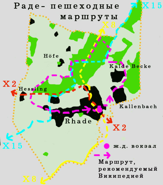 Karte (de+rus.): Wanderung in Dorsten-Rhade.